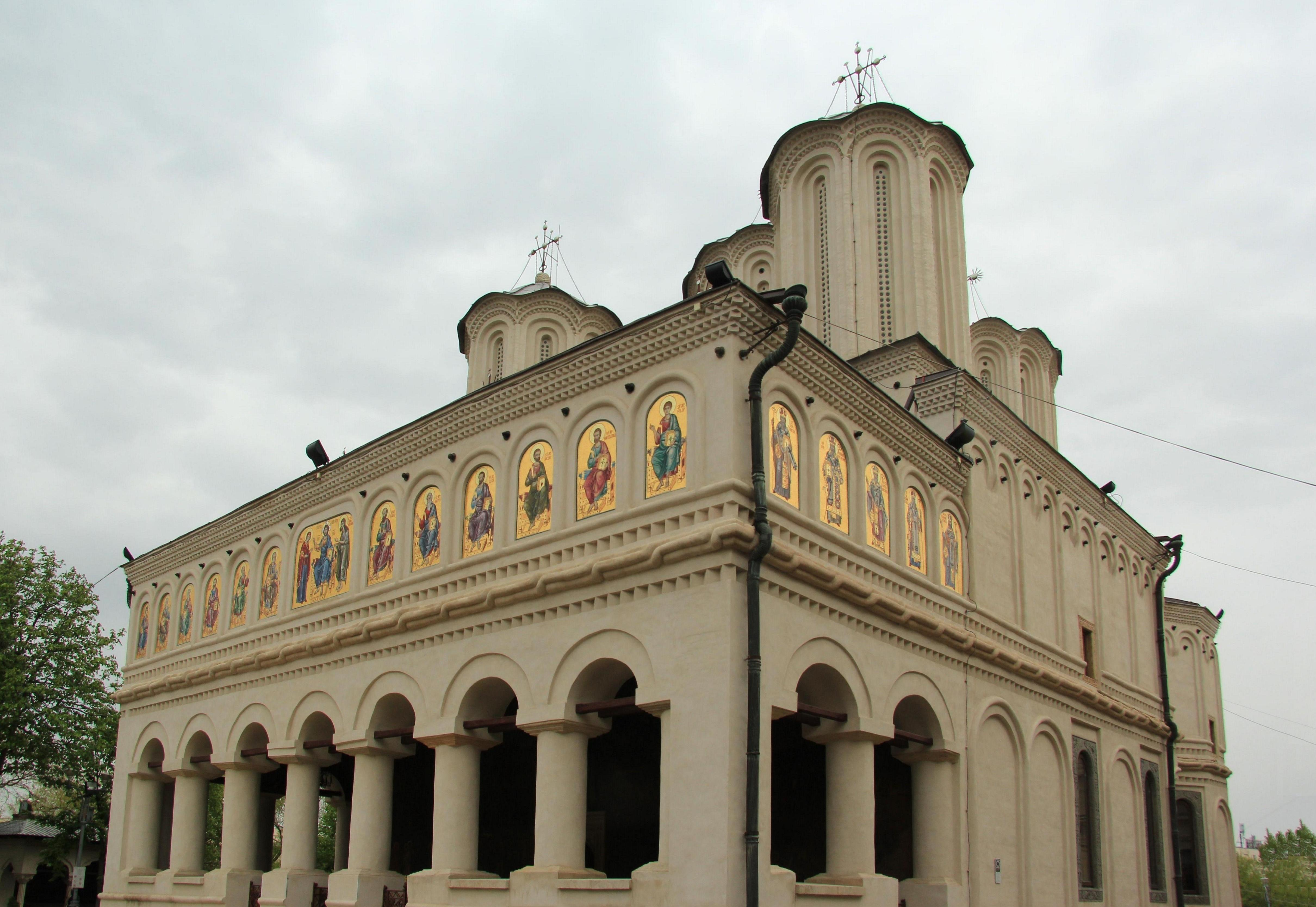 Rumänisch-orthodoxe Kathedrale in Bukarest, Rumänien